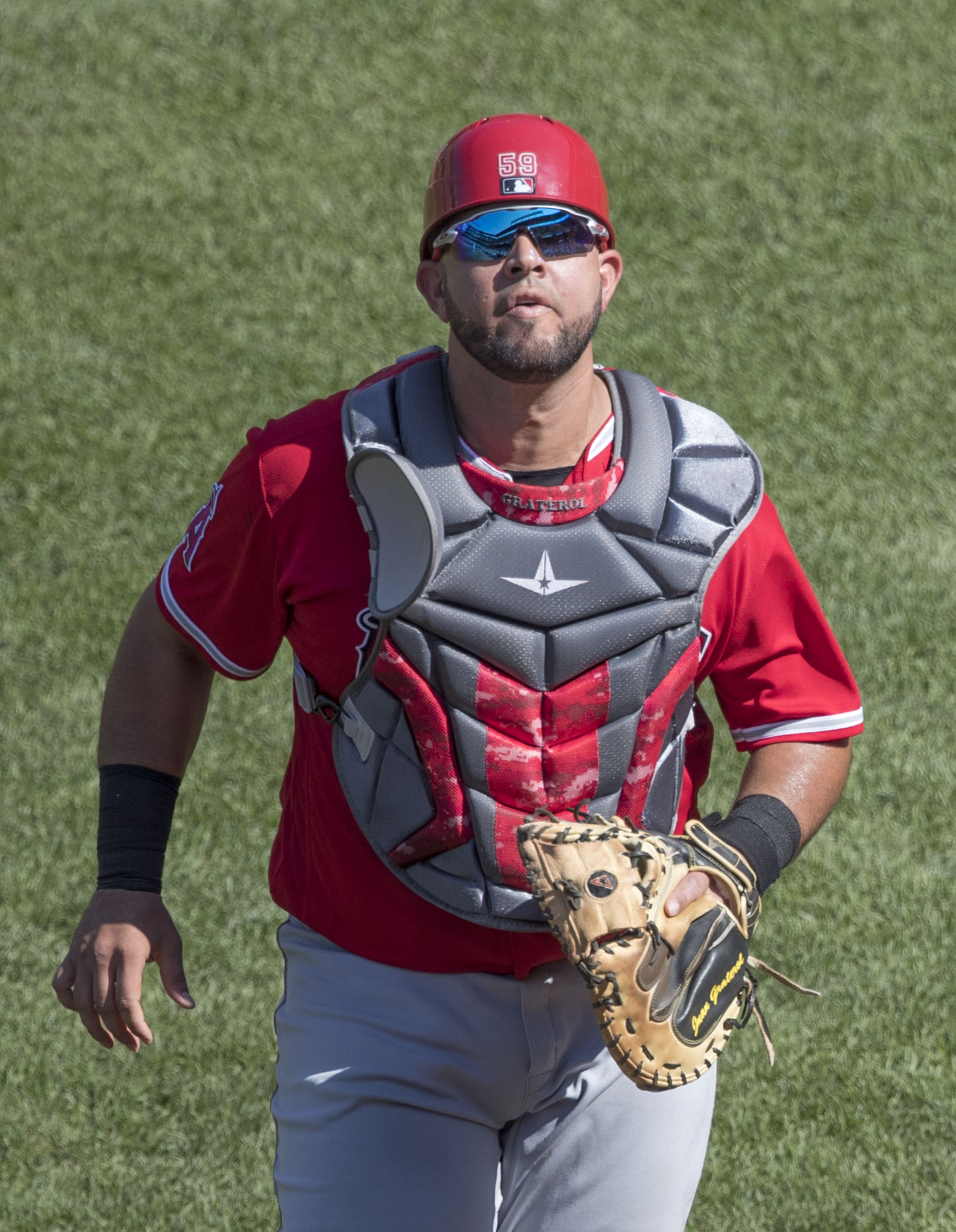 Angels at Orioles 8/20/17